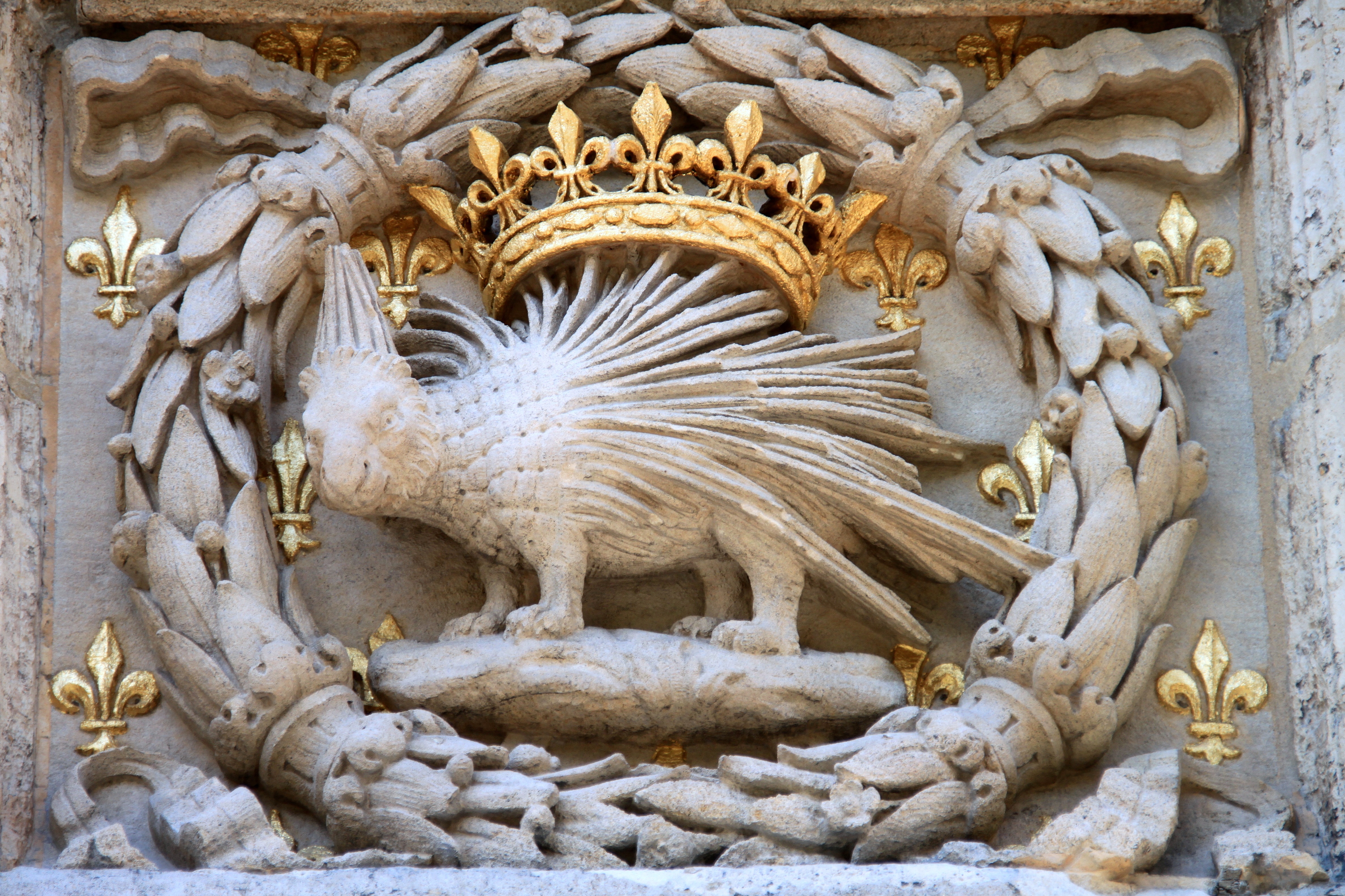 Hôtel de Bourgtheroulde (Rouen) Le porc-épic, emblème de Louis XII - the porcupine, King Louis XII of France's emblem. Hôtel de Bourgthéroulde, Rouen